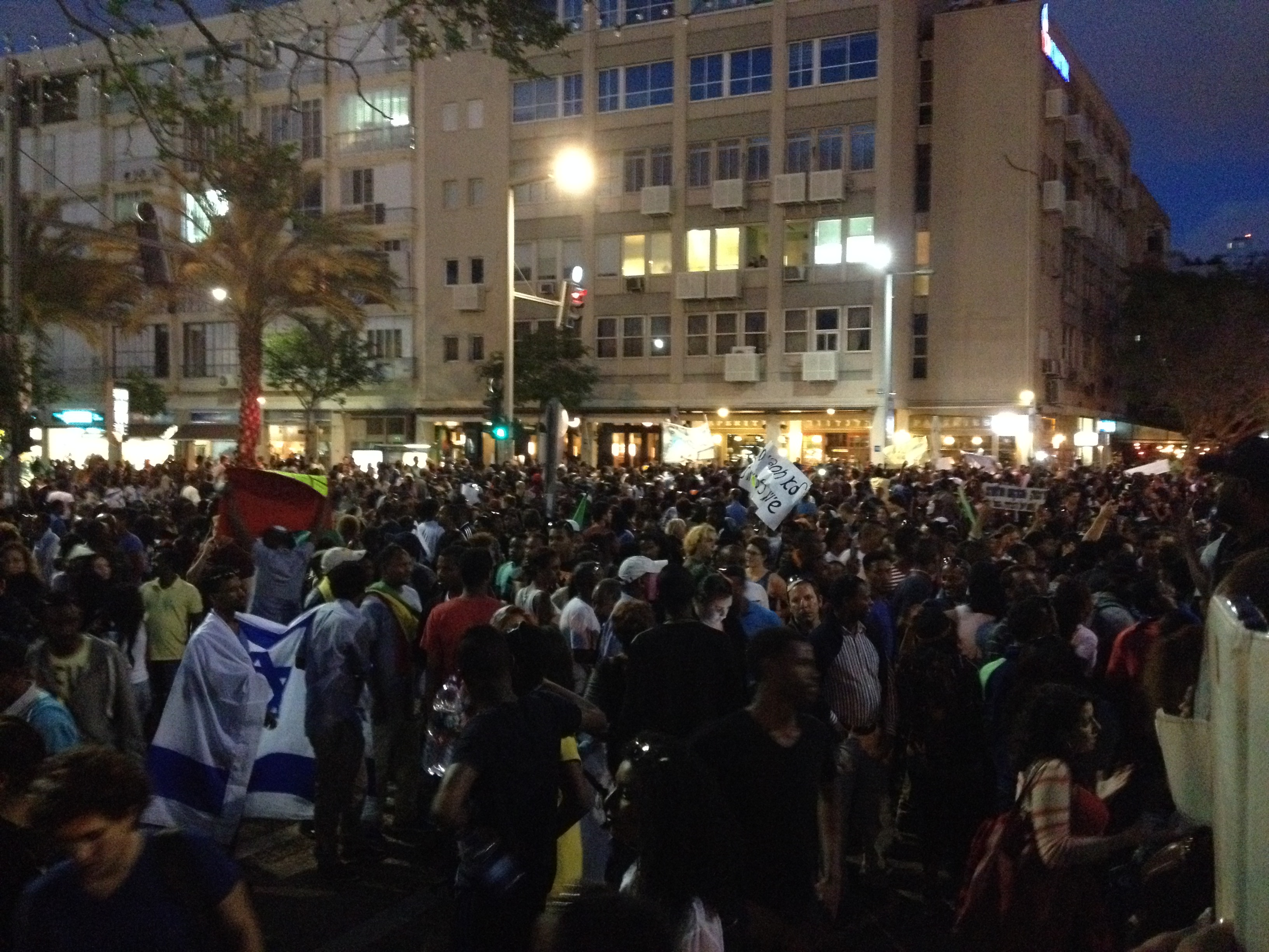 מפגינים חוסמים את רחוב אבן גבירול פינת שדרות דוד המלך, 3 במאי 2015